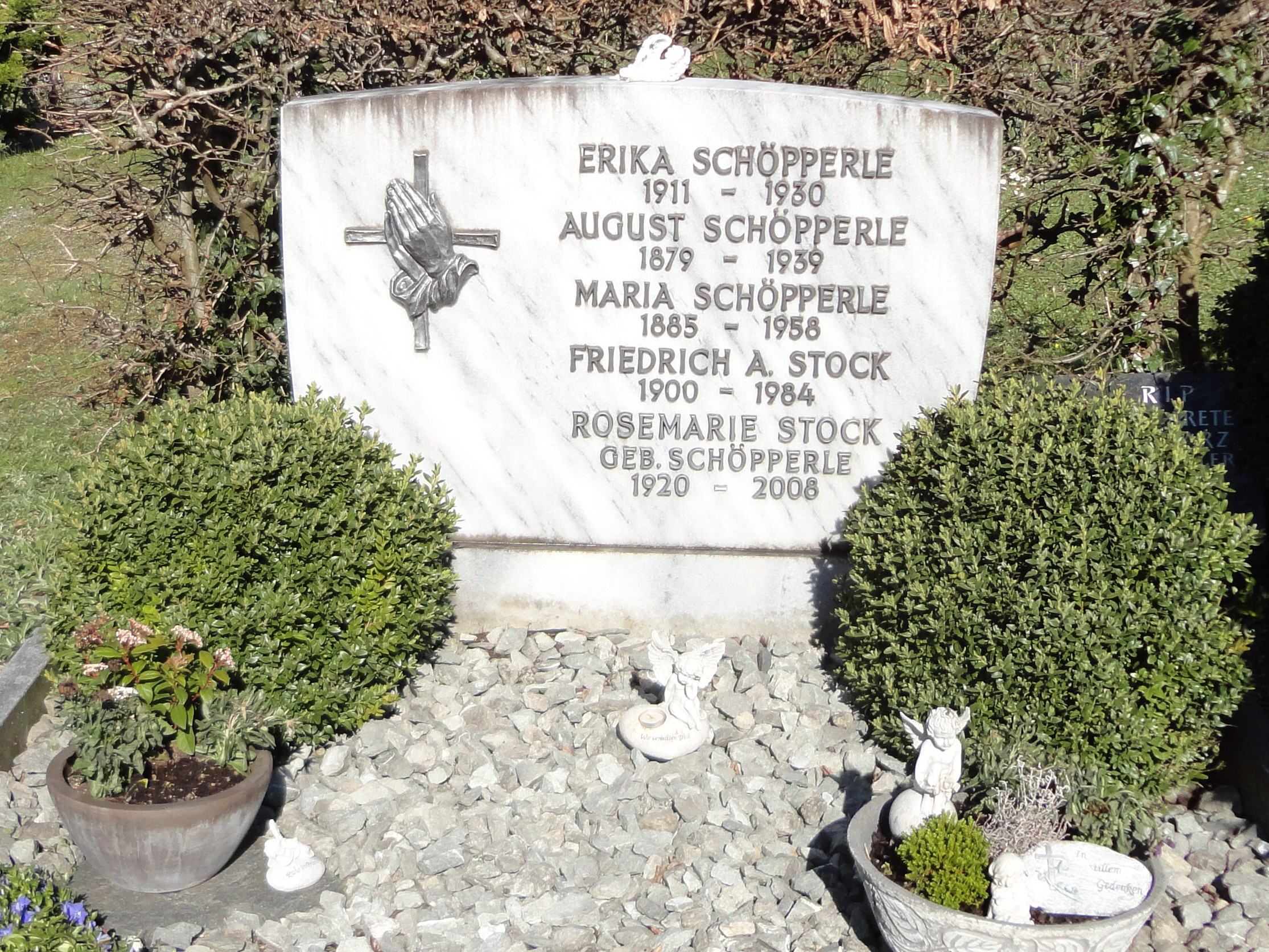 Letzte Ruhestätte von Friedrich A. Stock auf dem Hauptfriedhof Freiburg im Breisgau (im Familiengrab Schöpperle).